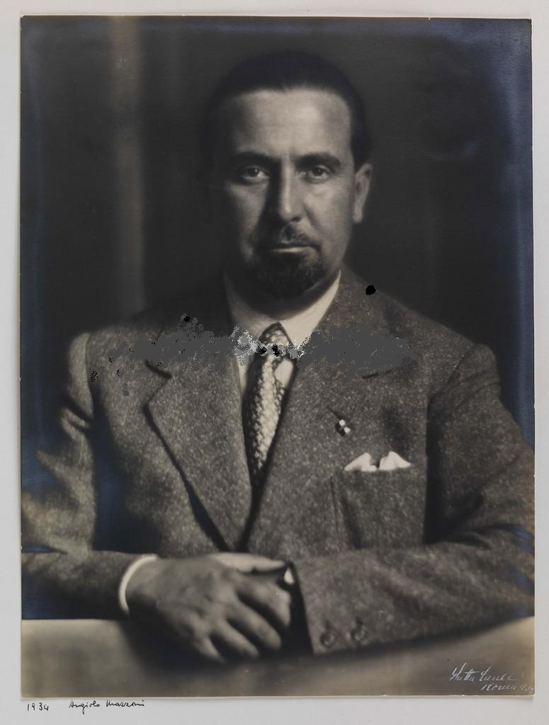 Ritratto fotografico di Angiolo Mazzoni realizzato da Ghitta Klein Carell, Roma 1934 (Museo di arte moderna e contemporanea di Trento e Rovereto - MART. Archivio del '900, Fondo Mazzoni Angiolo)